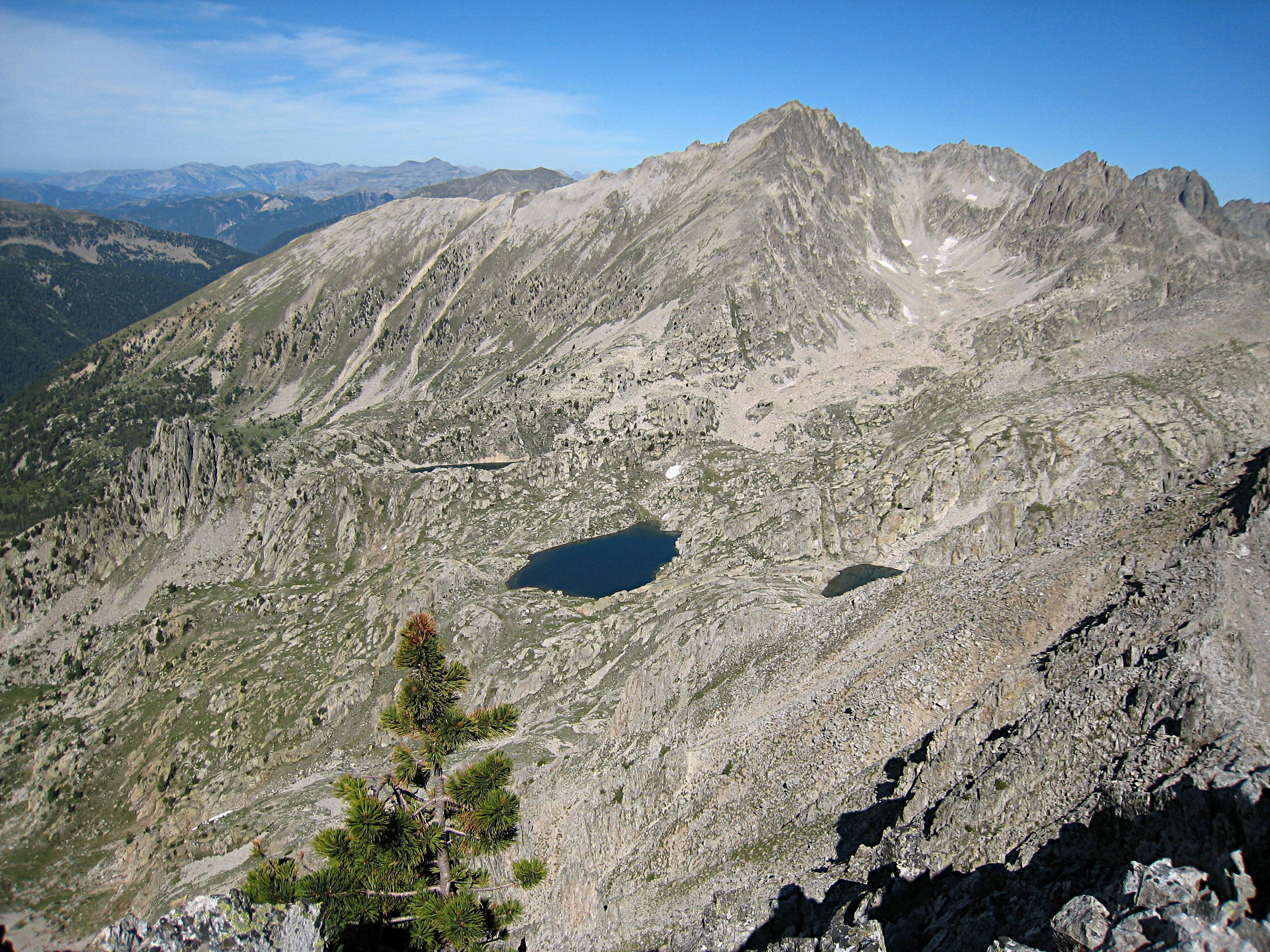 Vue des deux lacs des Bresses. Parc du Mercantour